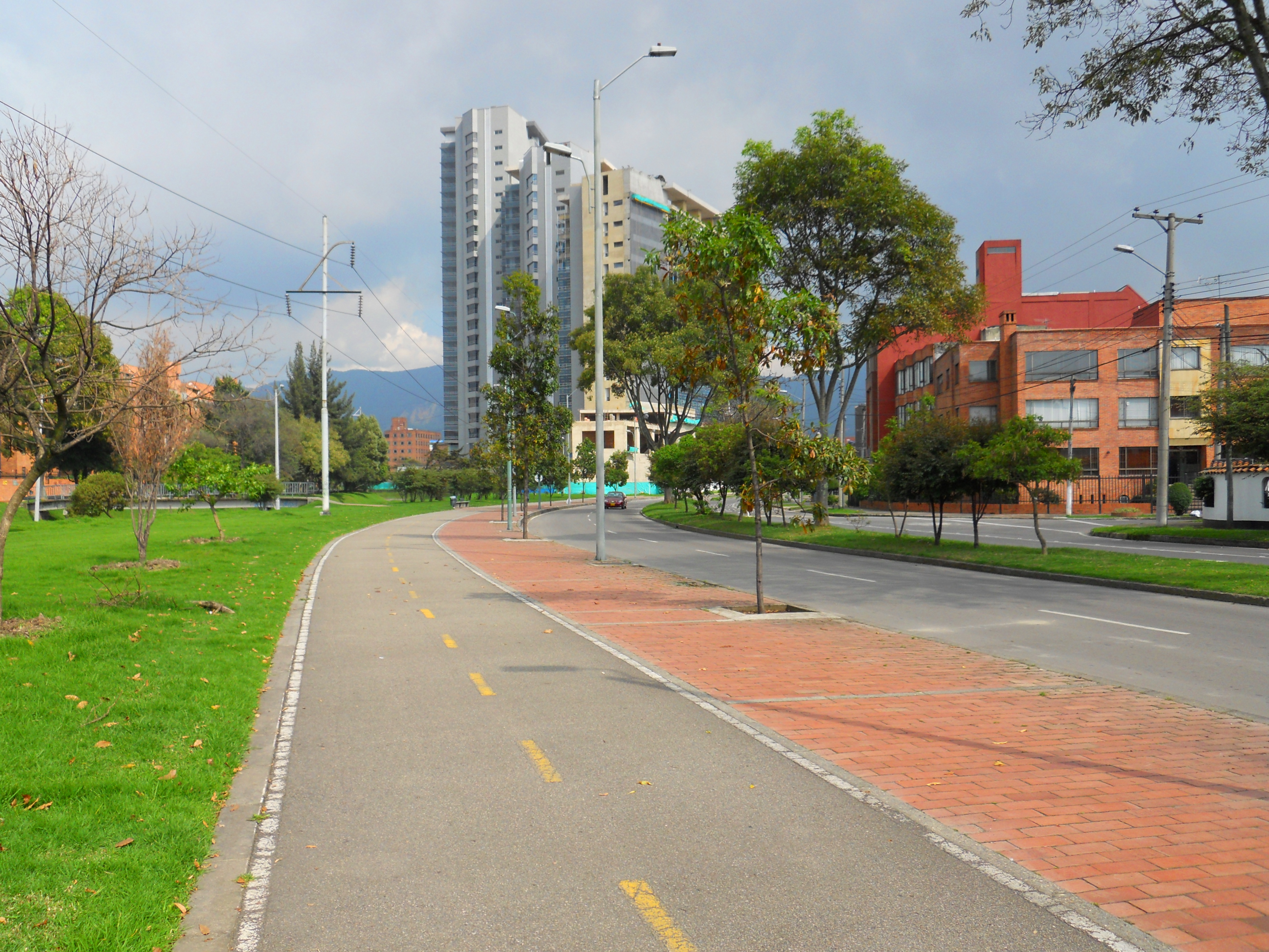 Cicloruta calle 111 alameda río Molinos, hacia la carrera 47.